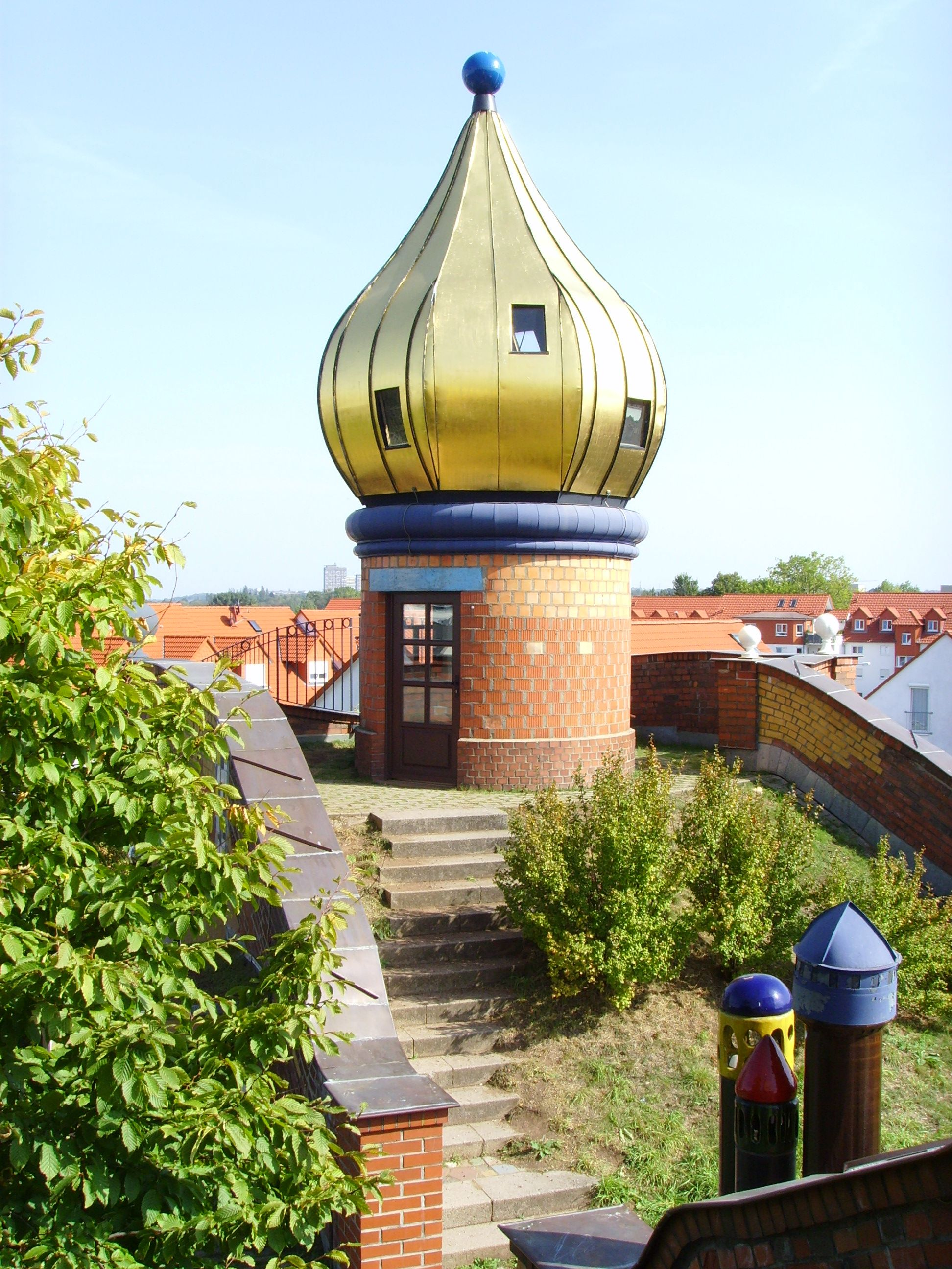 Municipal Kindergarten in Frankfurt am Main-Heddernheim, projected by Friedensreich Hundertwasser: roof garden and golden spire